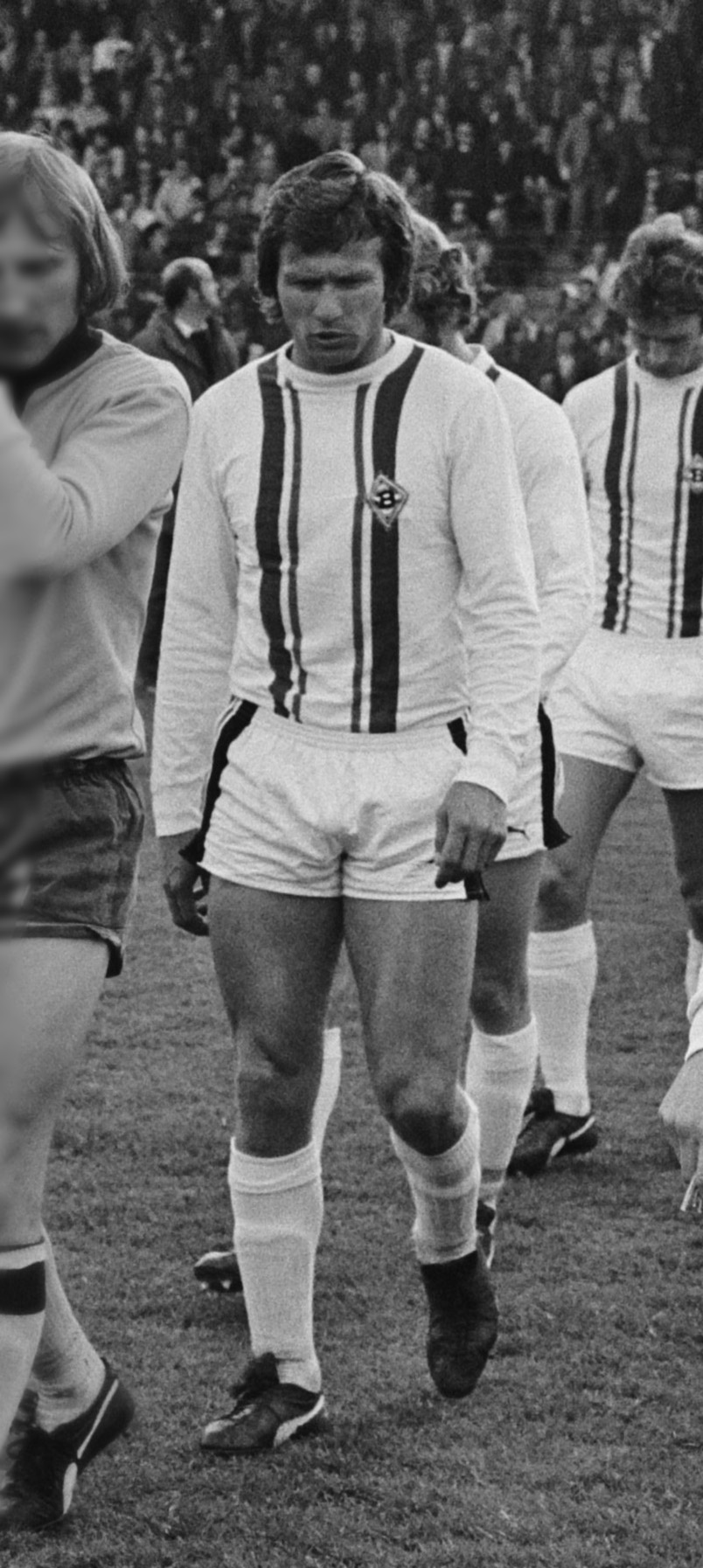 Collectie / Archief : Fotocollectie Anefo Reportage / Serie : FC Twente-Borussia Mönchengladbach 1-5 (returnwedstrijd finale Europa Cup 3) Beschrijving : Spelers betreden het veld Datum : 21 mei 1975 Locatie : Enschede, Overijssel Trefwoorden : spelers, sport, voetbal Fotograaf : Fotograaf Onbekend / Anefo Auteursrechthebbende : Nationaal Archief Materiaalsoort : Negatief (zwart/wit) Nummer archiefinventaris : bekijk toegang 2.24.01.05 Bestanddeelnummer : 927-9411